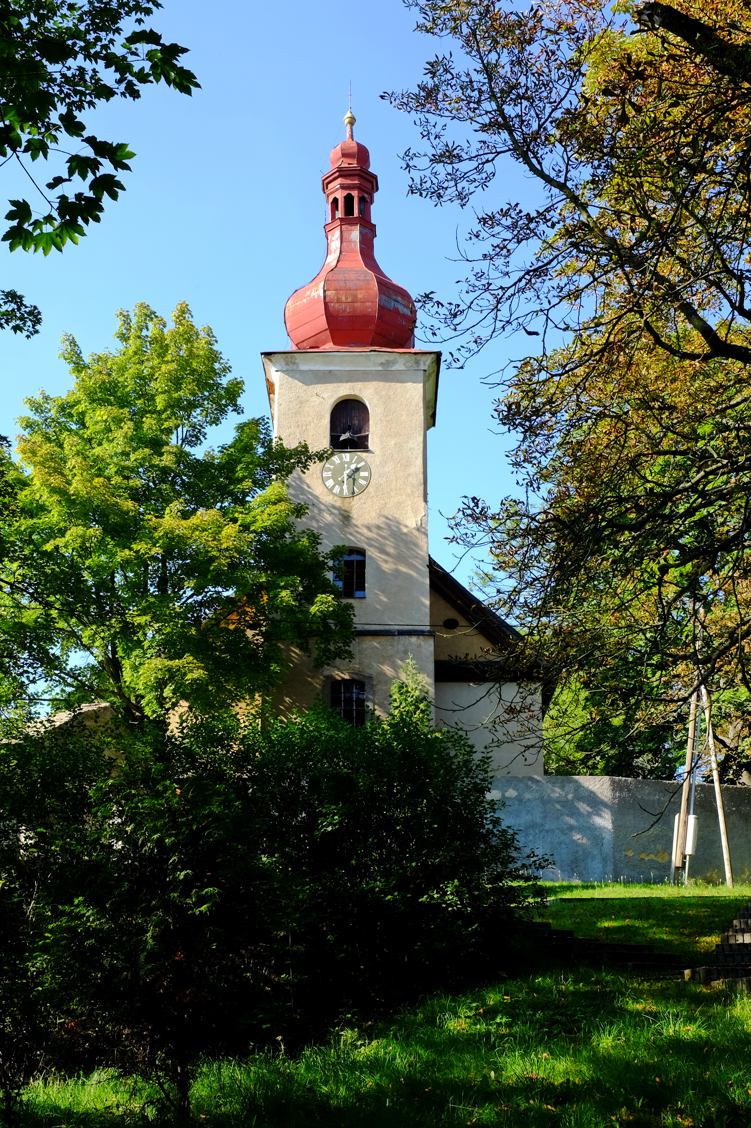 Kostel svatého Osvalda s farou, Nebanice 1, Nebanice.